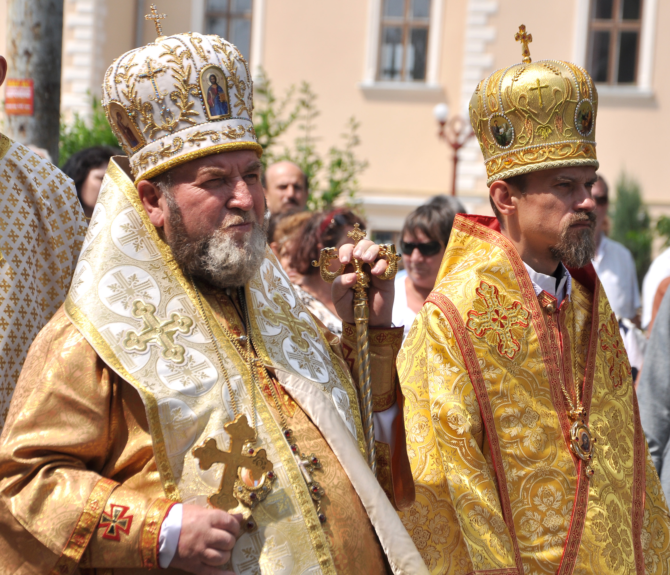 Молитовна хода «Стації митрополита Андрея», яка пройшла вулицями м. Тернополя 26 липня 2015 року на вшанування митрополита УГКЦ Андрея Шептицького. Архієпископ і митрополит Тернопільсько-Зборівський Василь (Семенюк) і єпископ-помічник Тернопільсько-Зборівський Теодор (Мартинюк) (УГКЦ).